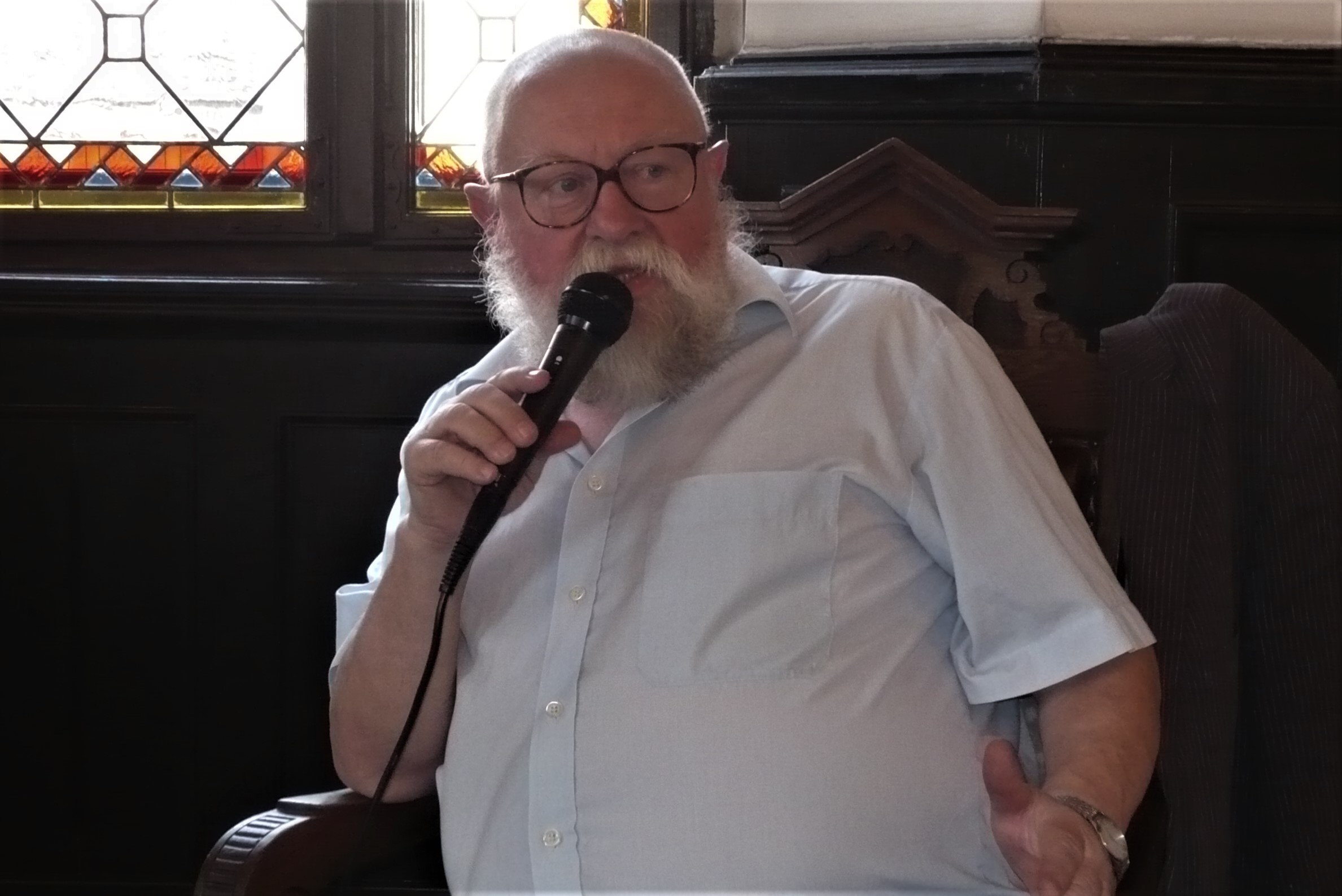 Jerzy Bralczyk. Festiwal Góry Literatury, 6.07.2017